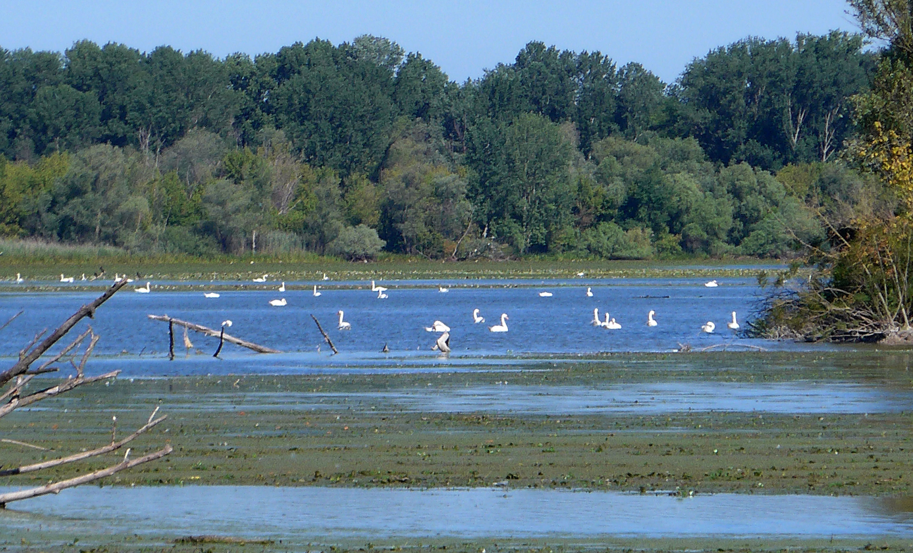 riserva naturale Vallazza (Q3936736)